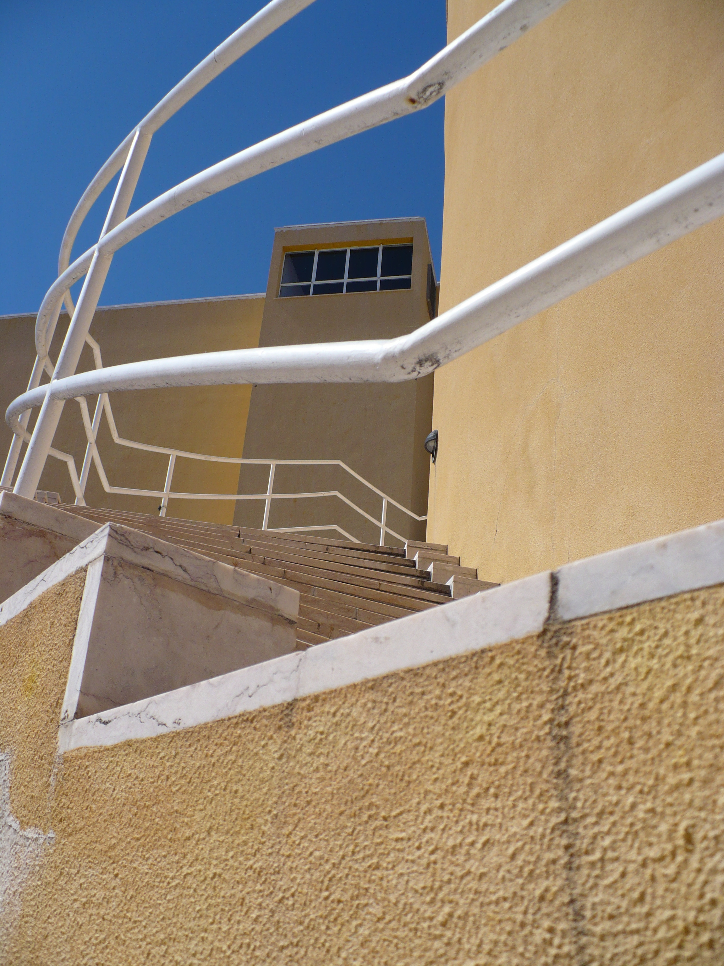 Edíficio da Escola Superior de Teatro e Cinema